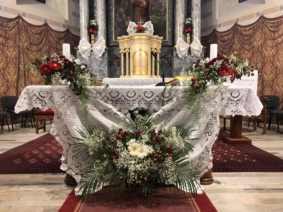 Šlinga na oltaru